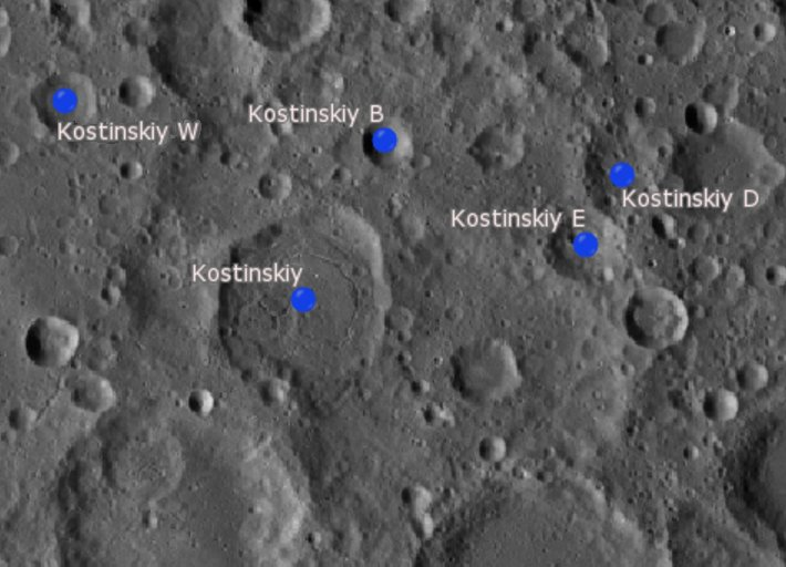 Cráter lunar Kostinskiy. Cráteres satélite. (Imagen LRO)